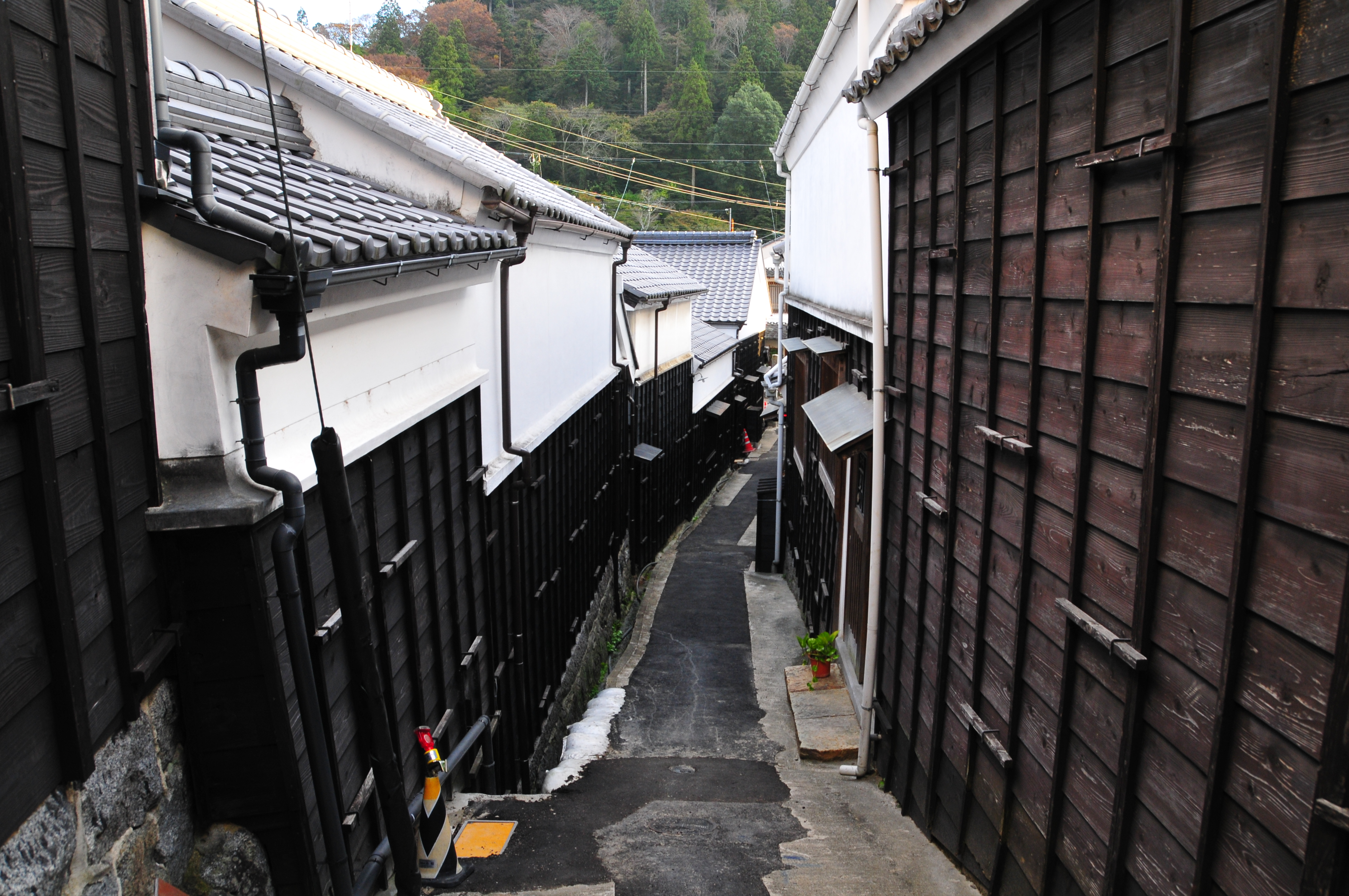 愛知県豊田市足助町のマンリン小路。